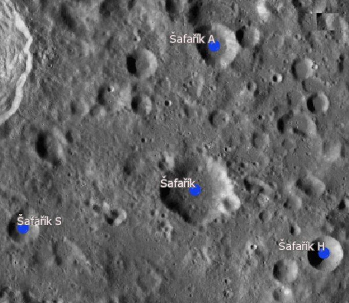 Cráter lunar Šafařík. Cráteres satélite. (Imagen LRO)